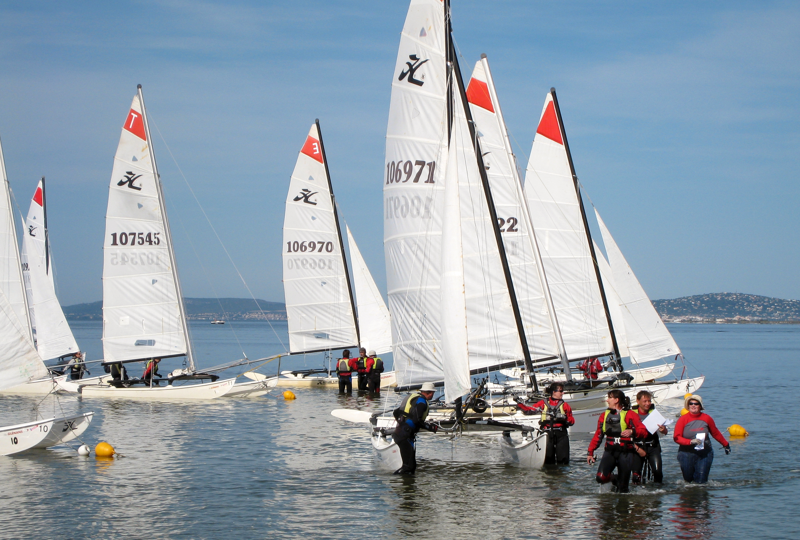 Katamaran-"Expedition" 2008 der Segelschule Glénans, Stützpunkt Marseillan